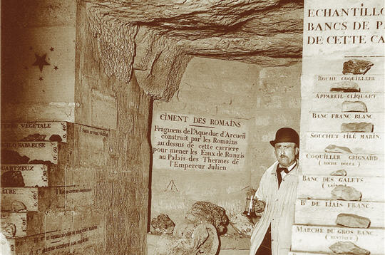 « Cette photo du 19ème siècle montre que, sur les marches de ce genre de "Cabinet de Minéralogie", étaient présentés des échantillons de roches (de la terre végétale à la couche de craie) ; sur les contre-marches étaient écrits le nom de la couche géologique et sa hauteur réelle. Sur les banquettes autour étaient déposés des fossiles, des concrétions, de vieux outils trouvés par les ouvriers de l'Inspection des carrières. »